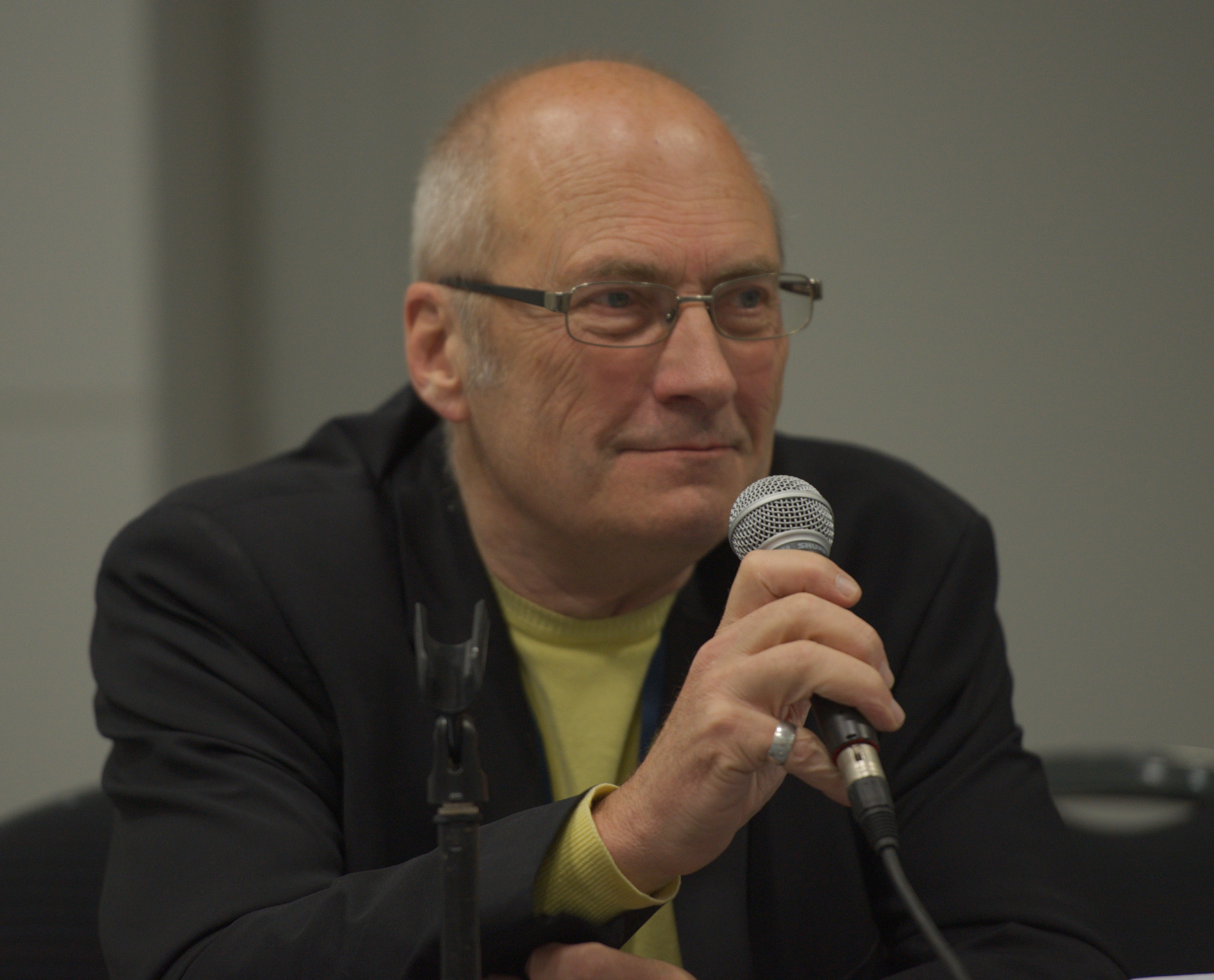 Johan Clute under hedersgästintervjun på Loncon, Worldcon 2014.